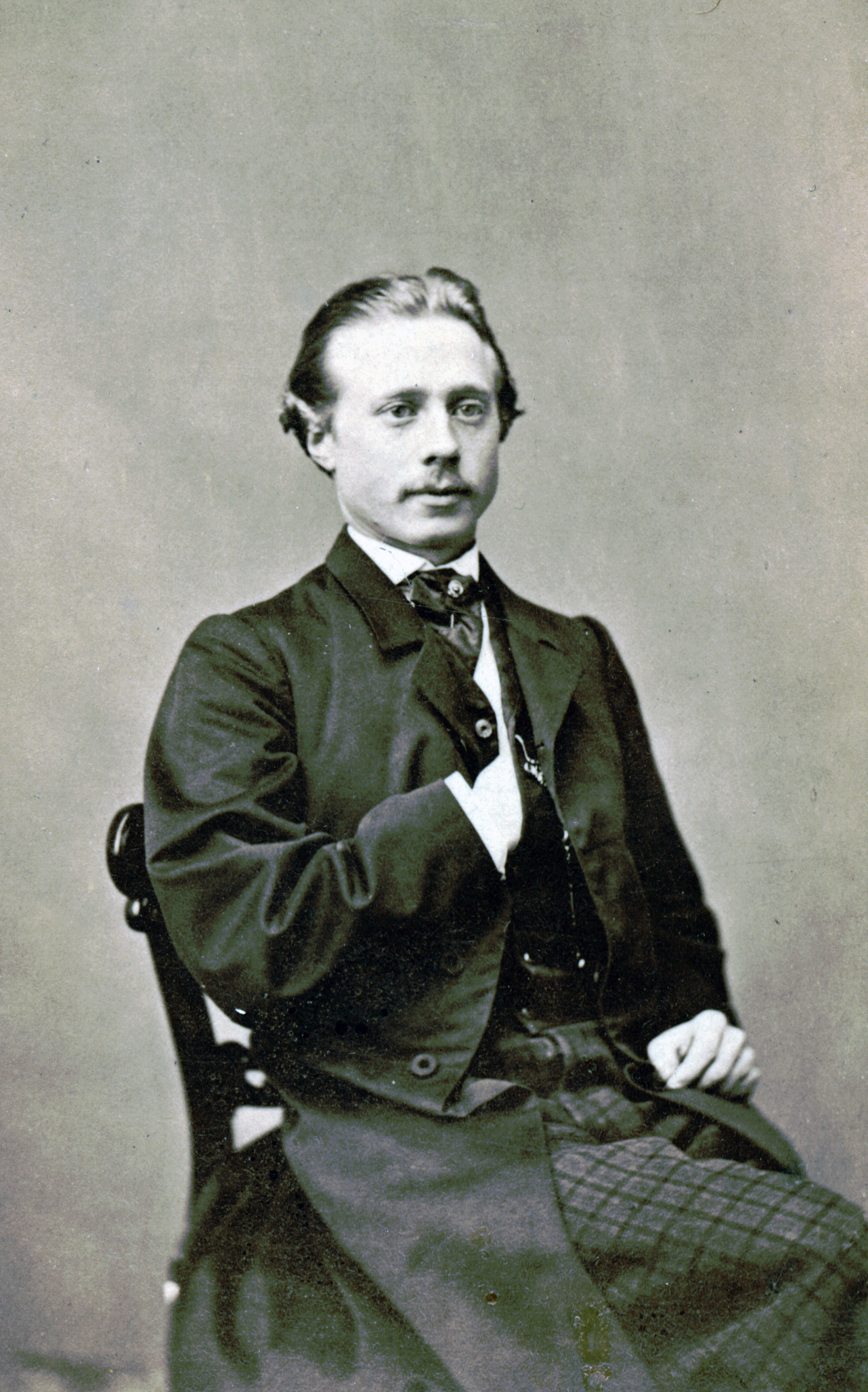 Gustaf Bergström, skådespelare vid Södra teatern 1862